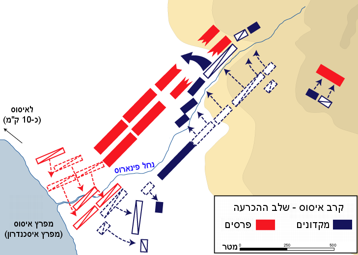 קרב איסוס, שלב ההכרעה